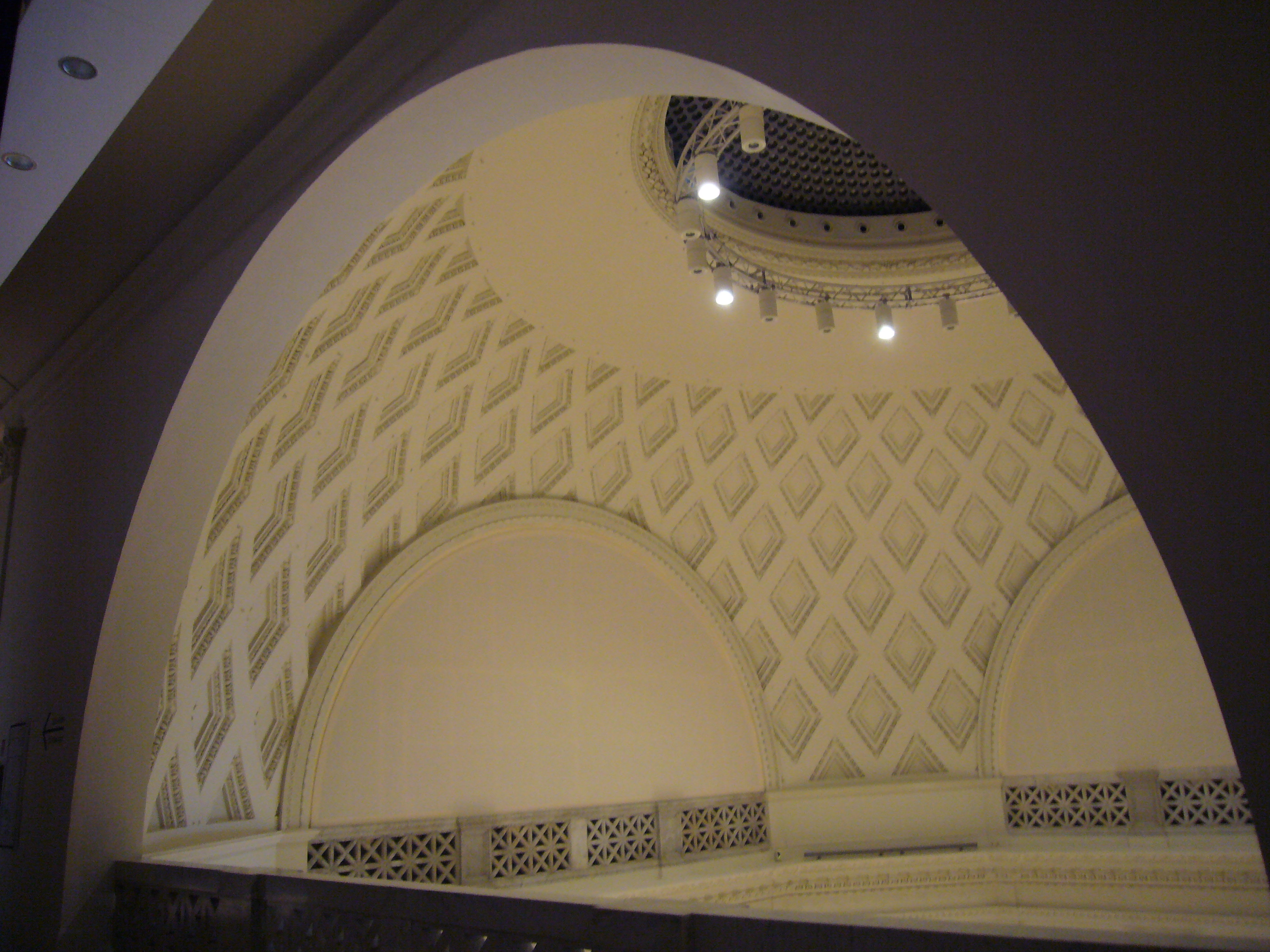 Roma, Palazzo delle Esposizioni - cupola interno